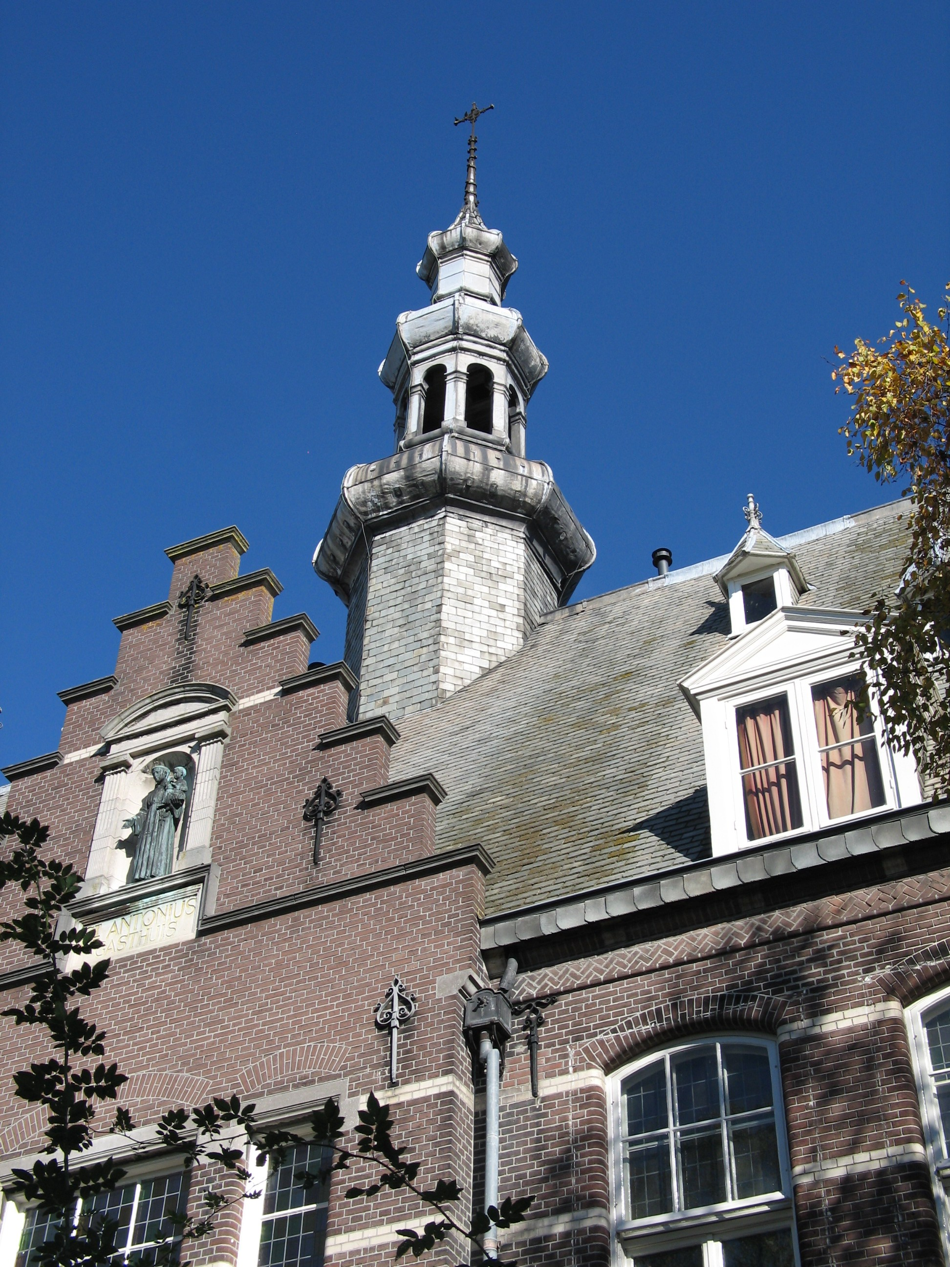 Voormalig St.-Antoniusziekenhuis aan de Prins Hendriklaan te Utrecht